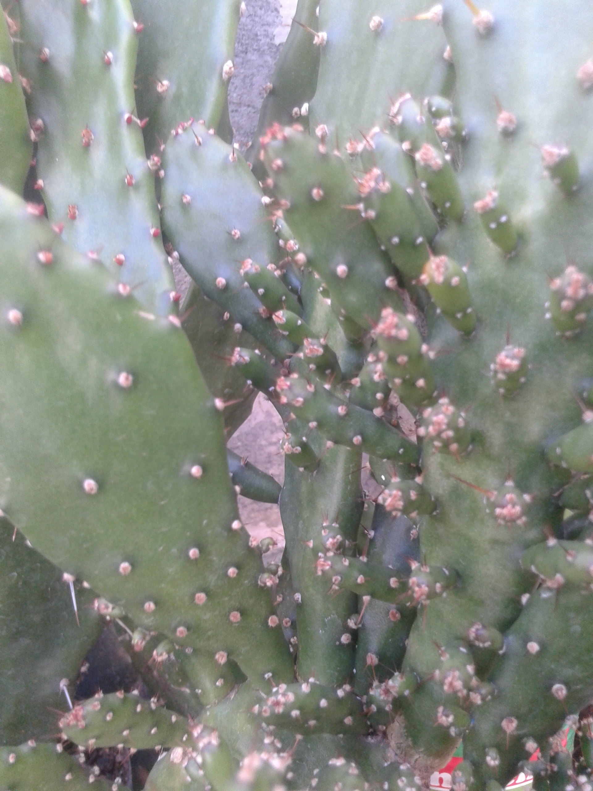 Hojas de una especie no identificada de cactus con sus brotes.